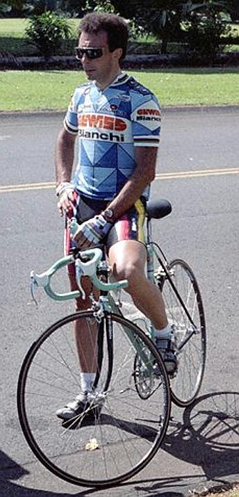 Moreno Argetin 1987